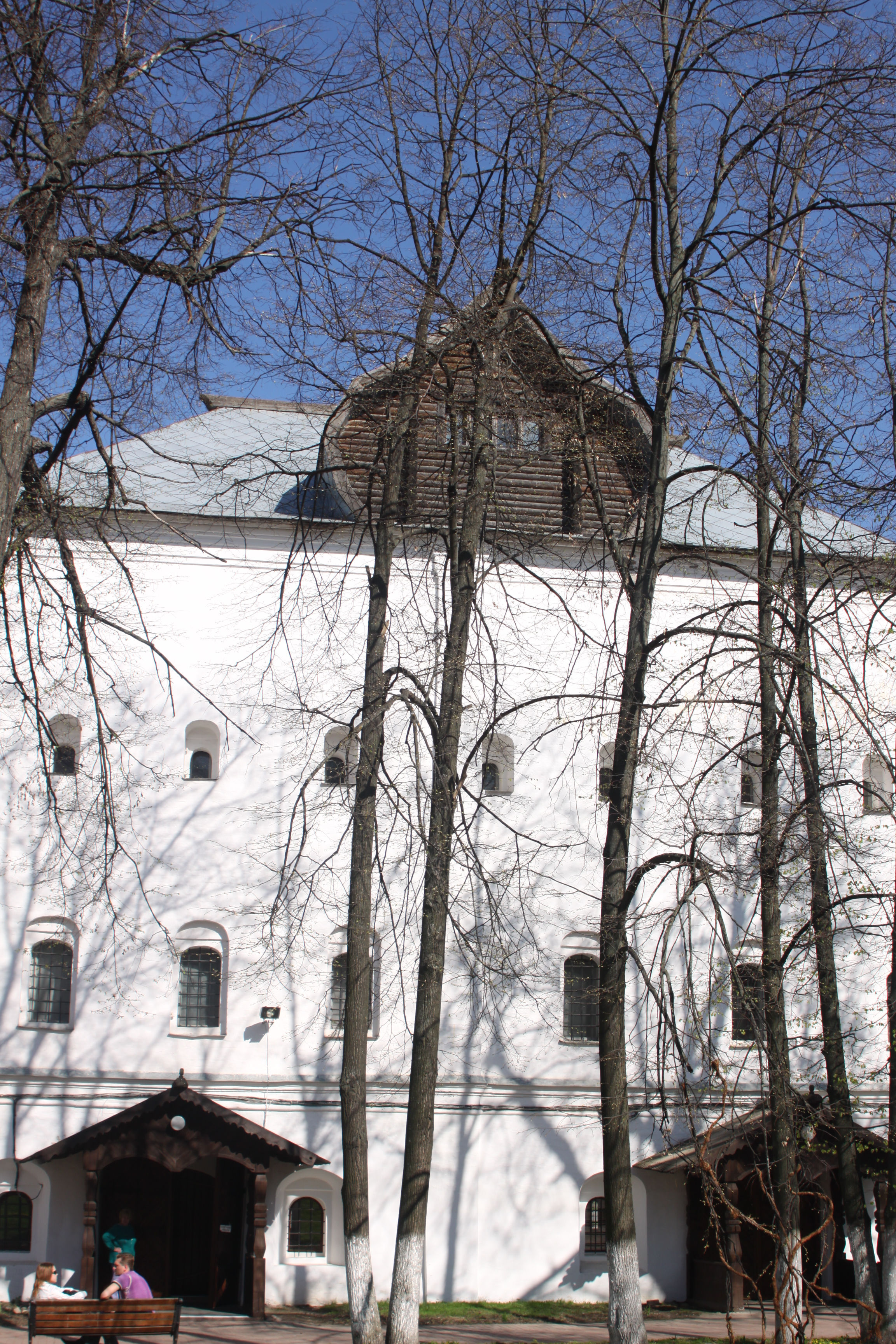 Трехэтажный корпус Архиерейского двора в Вологде